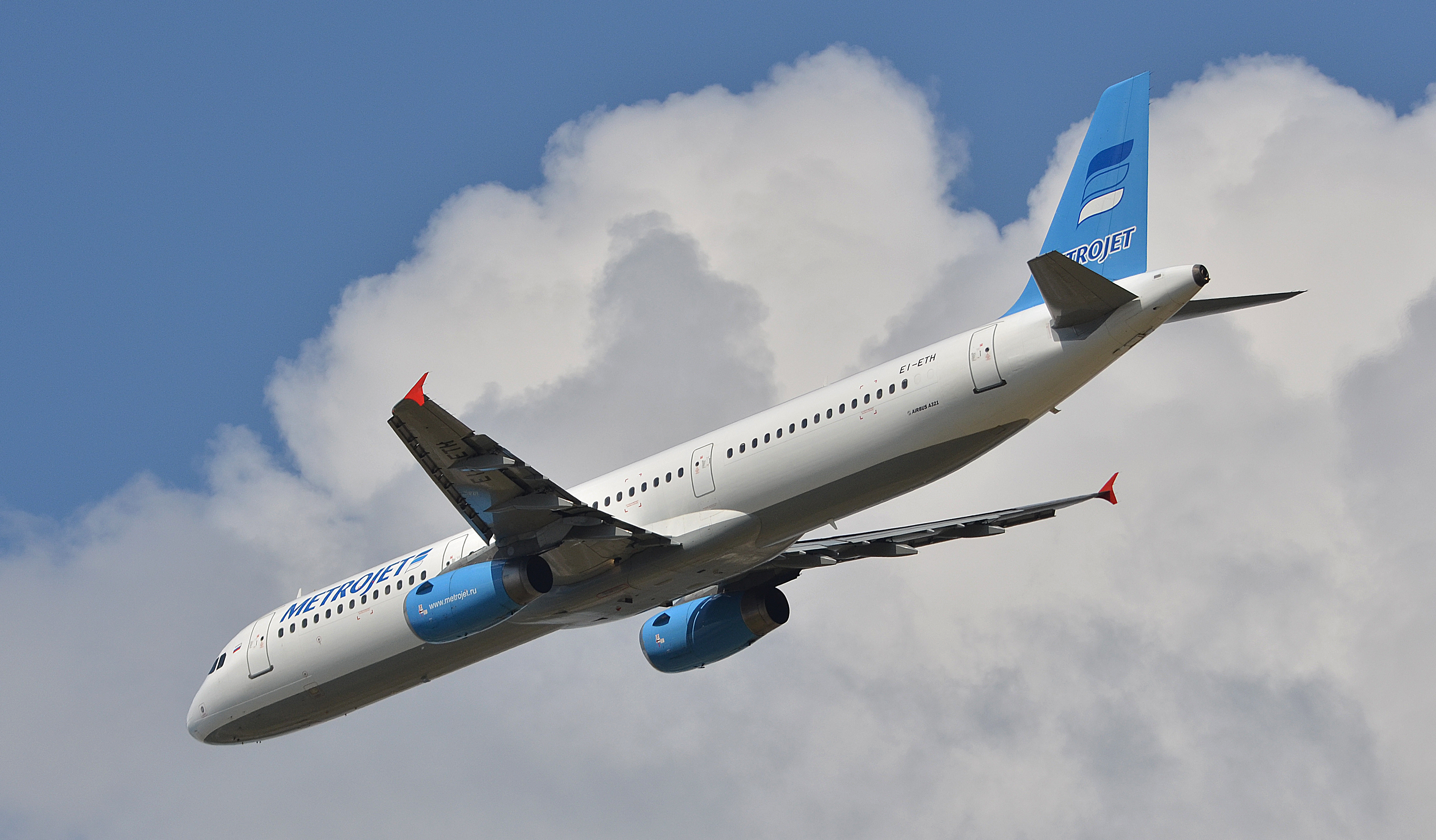 Можно увидеть здесь : You can see here